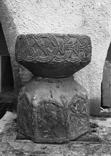 Dopfunt, 1100-tal. Kategori: (04) DopfuntarDopfunt, 1100-tal.